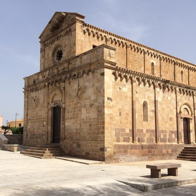 Cattedrale di Santa Maria di Monserrato